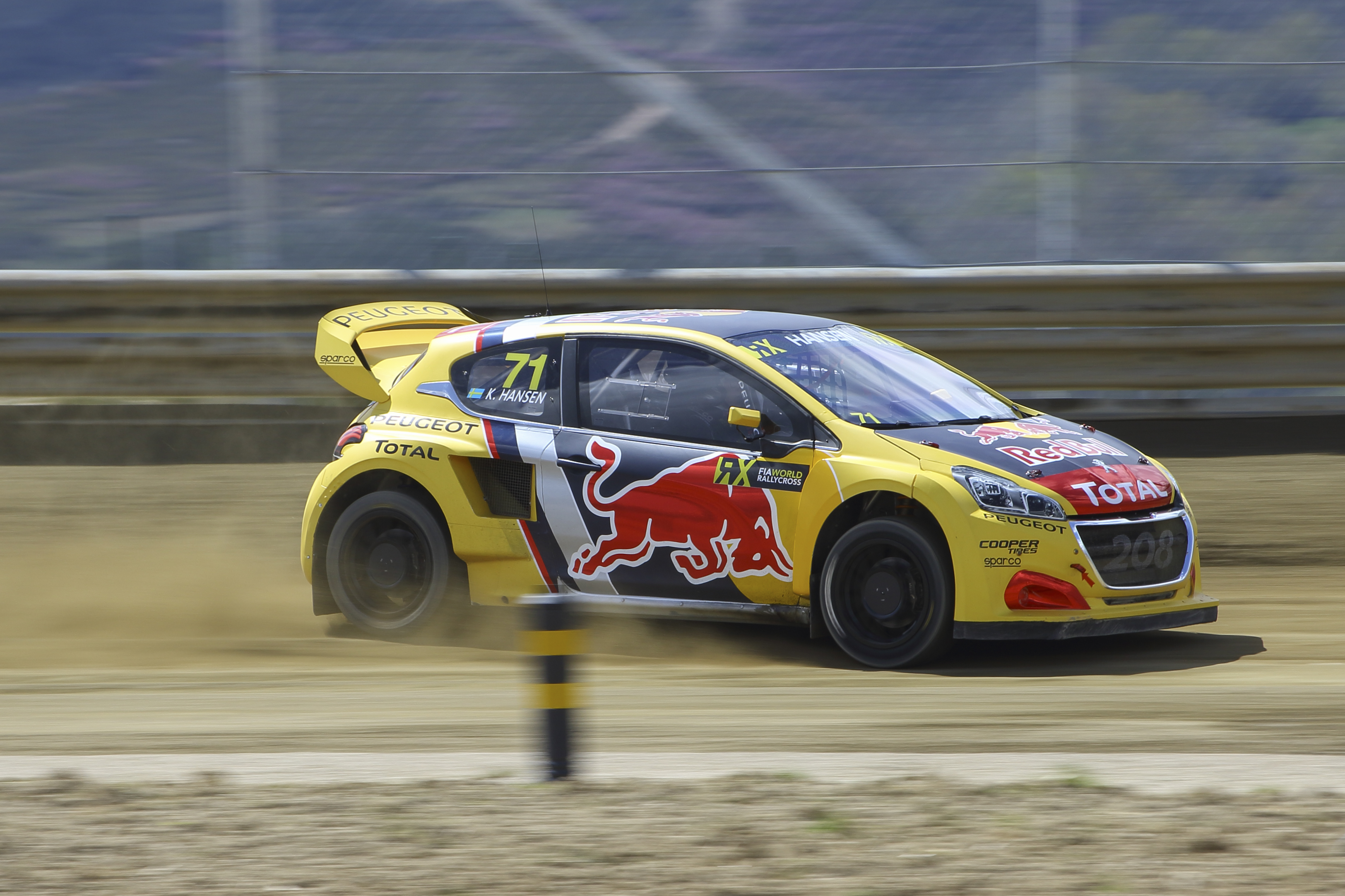 Johan Kristofferssonganó en la final en Portugal, tras hacerlo en España, el Sueco se afianza en el liderato provisional del Campeonato. Sin embargo no fue el mejor en las mangas de entrenamiento que fueron dominadas por Andreas Bakkerud.